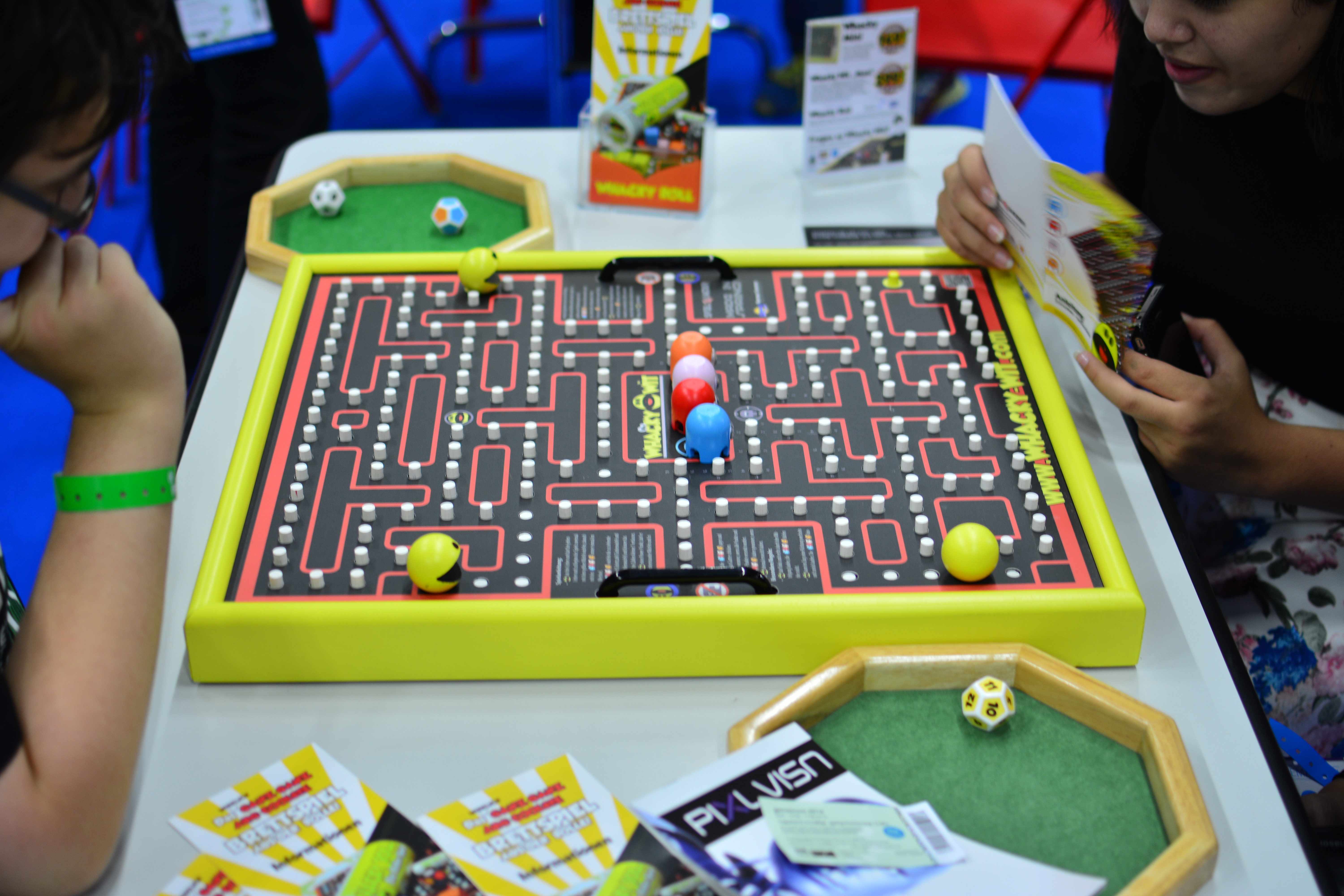 Gamescom 2014 - 14_08_19 - 33